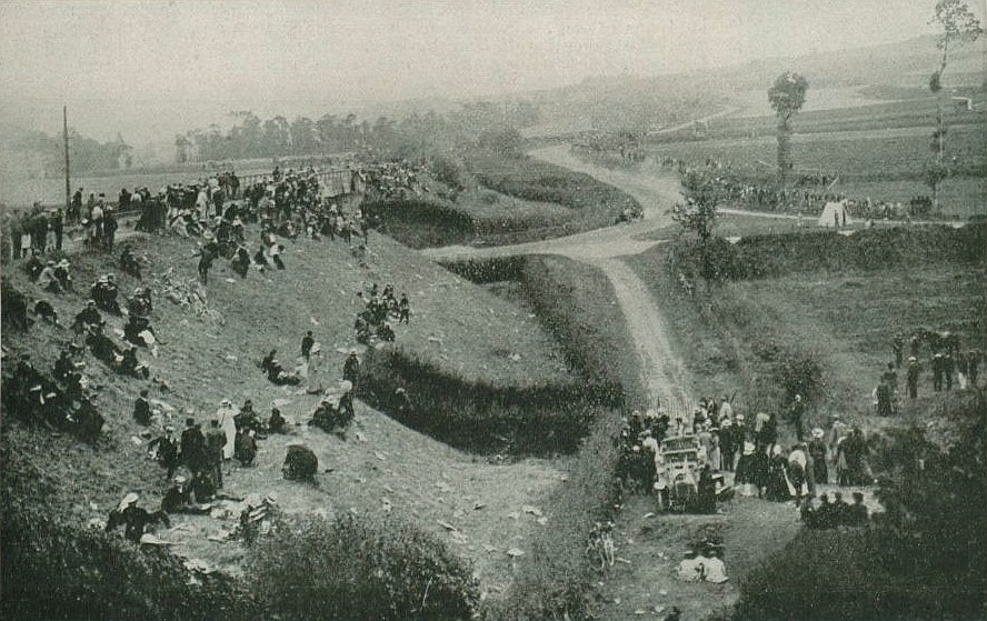 Le circuit de Dieppe au pont d'Ancourt (GP de l'A.C.F. 1908) - La vie au Grand Air du 25 juillet 1908,p.70 (photo Ruck)